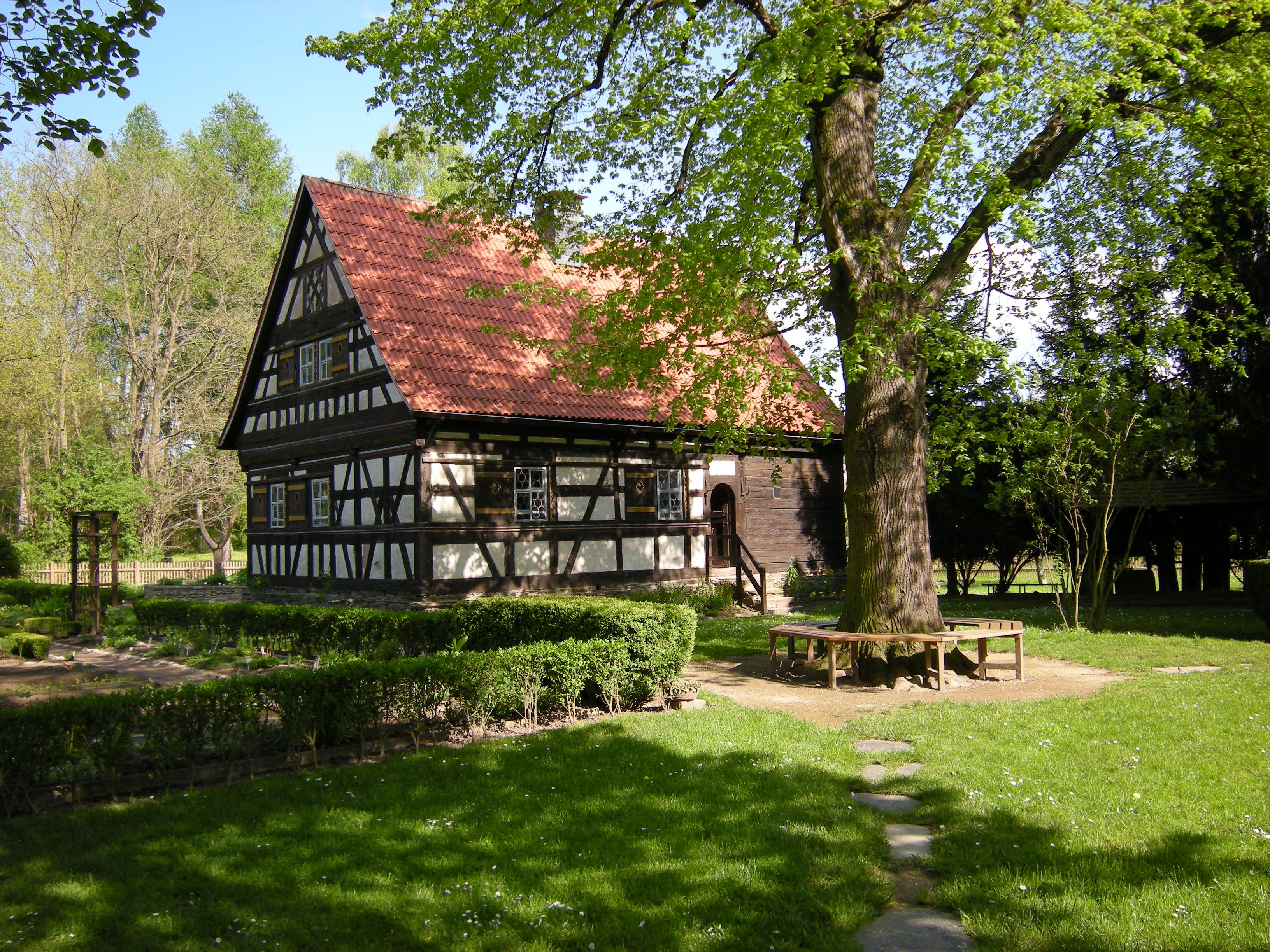 Rudolstadt - Park und Fachwerkhaus Freilichtmuseum.jpg